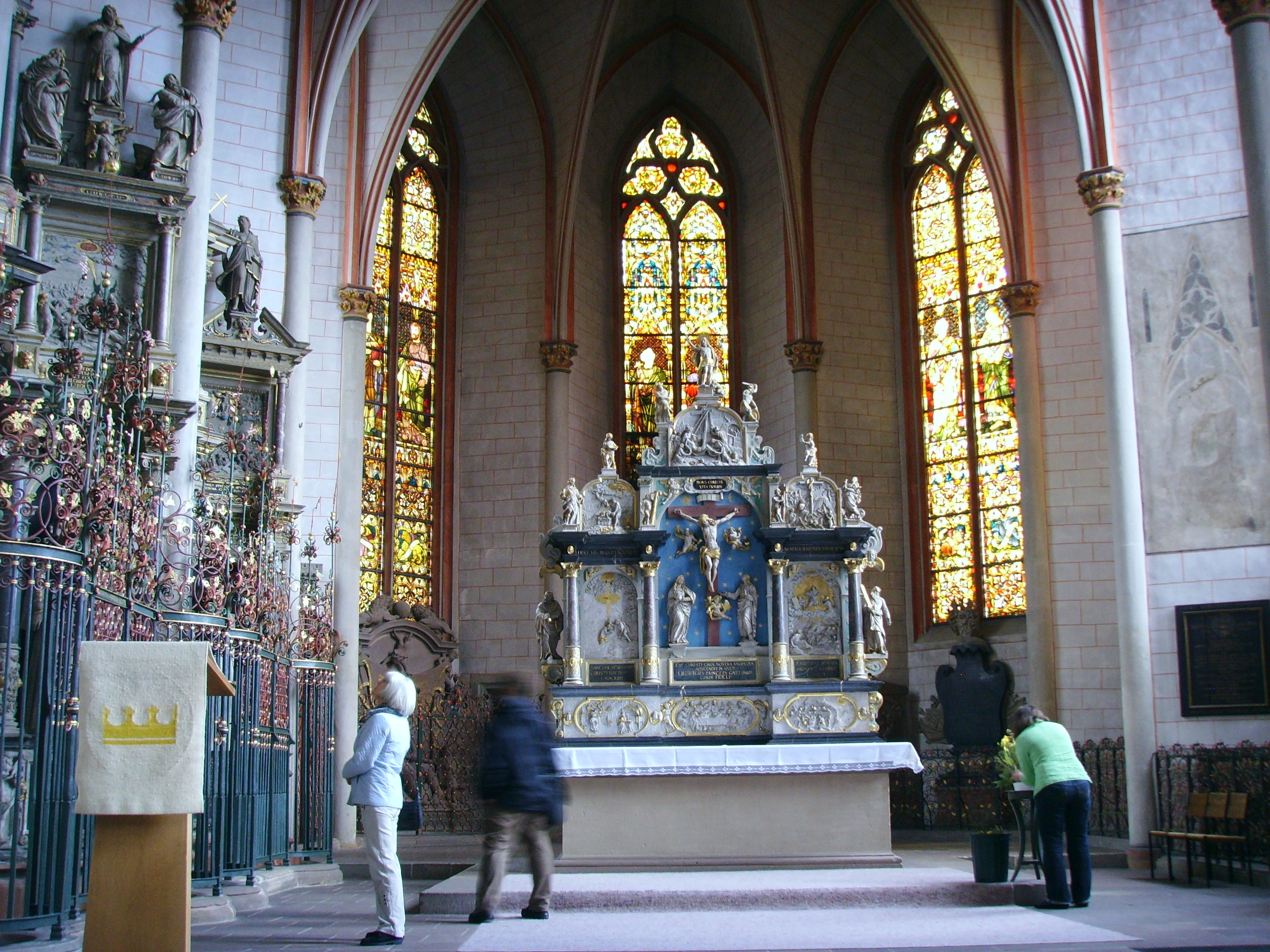 Marburg, St. Marienkirche, Chor. Die meisten Wände sind im Bildersturm unter dem calvinistischen Landgrafen Moritz dem Gelehrten weiß getüncht worden. Heute ist die Kirche wieder lutherisch.